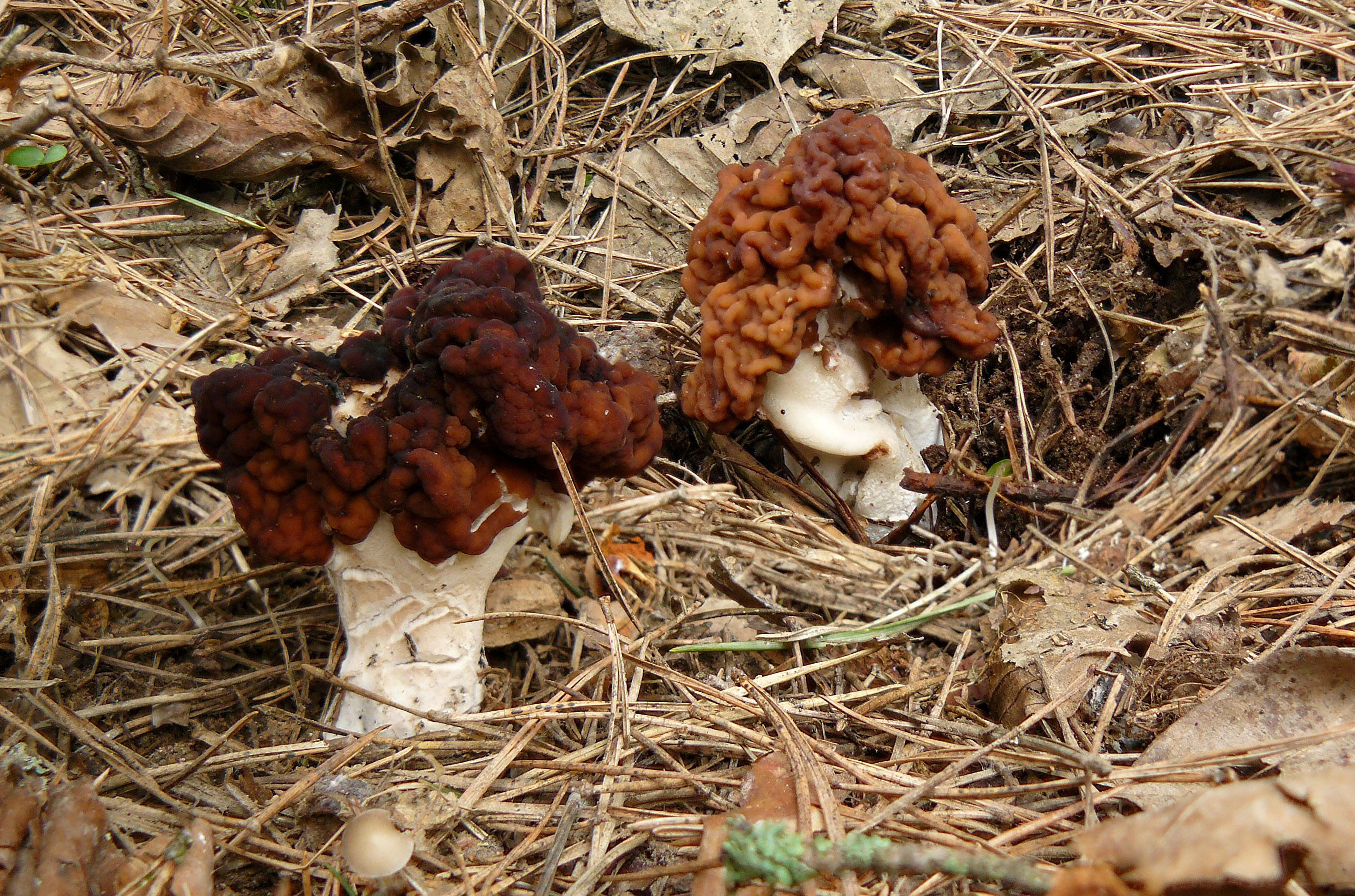 Přírodní recervace Na Ivance. Ucháč obecný - Gyromitra esculenta.